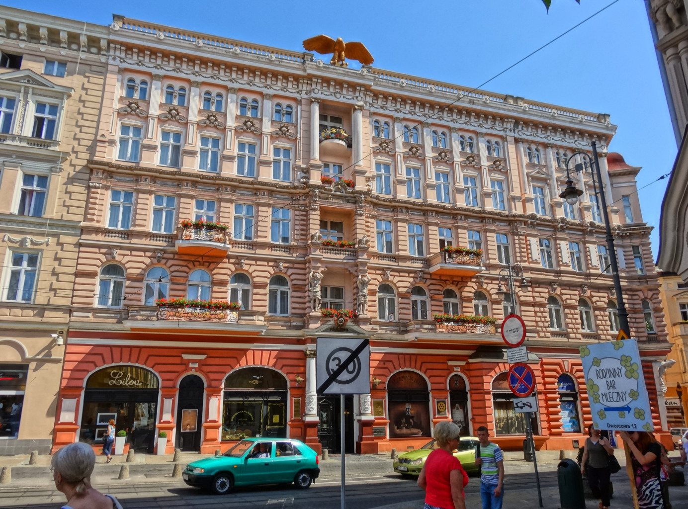 Hotel Pod Orłem w Bydgoszczy przy ul. Gdańskiej 14 (zbud. 1896, Józef Święcicki)